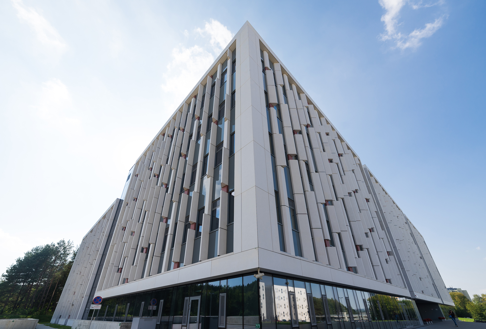 VU Gyvybės mokslų centre vykdomi aukščiausio lygio moksliniai tyrimai bei studijos.